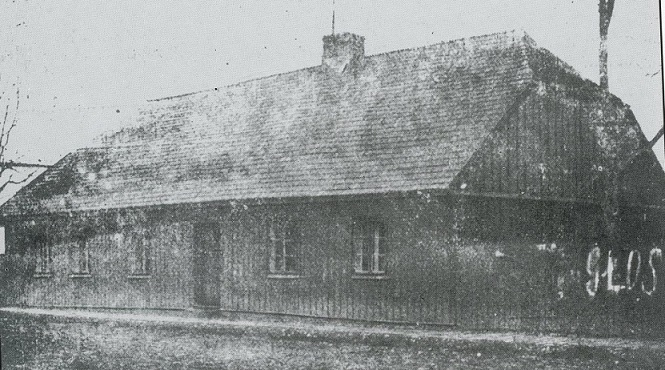 stara szkoła nr 1